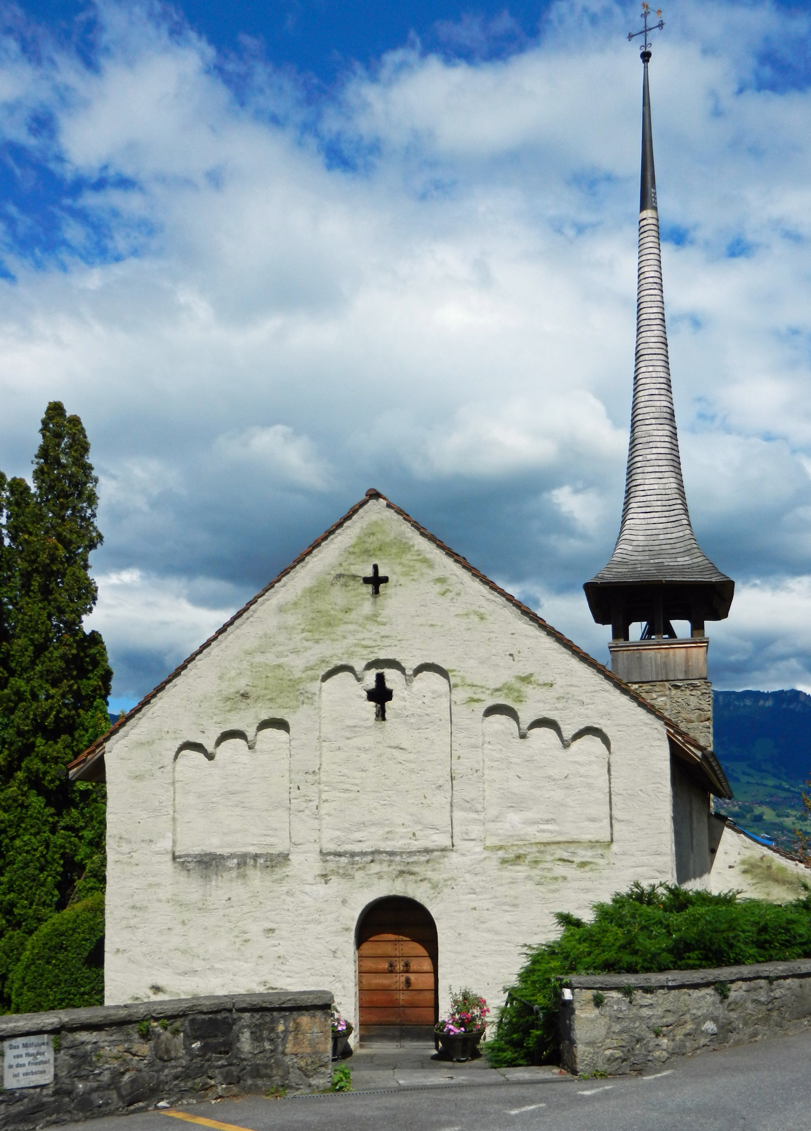 Romanische Kirche aus dem 10./11.Jhdt